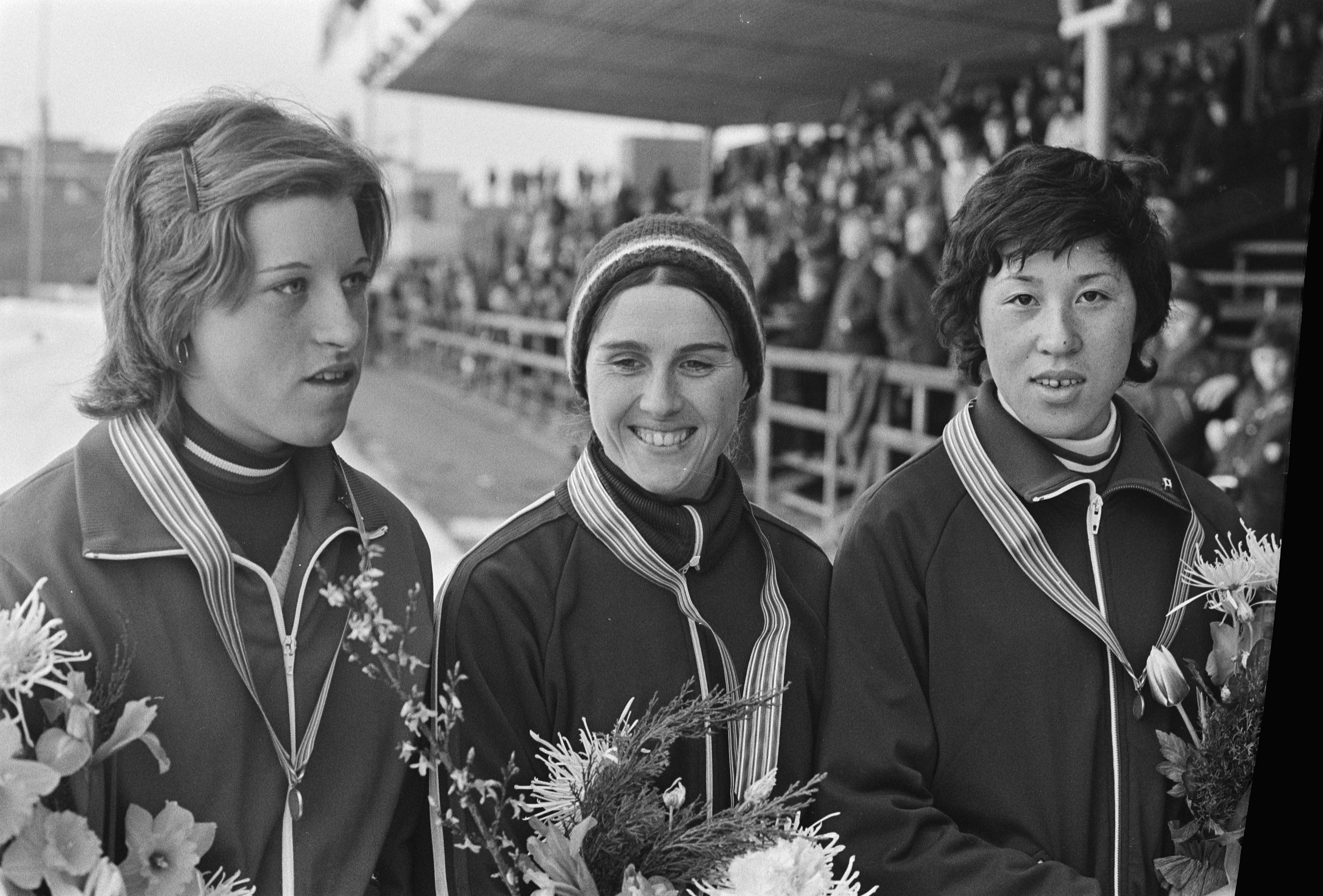 Collectie / Archief : Fotocollectie Anefo Reportage / Serie : [ onbekend ] Beschrijving : Wereldkampioenschappen schaatsen dames in Assen; Sheila Young (VS) tijdens huldiging (midden) Datum : 22 februari 1975 Locatie : Assen Trefwoorden : SCHAATSEN, huldigingen, sport, wereldkampioenschappen Persoonsnaam : young Fotograaf : Peters, Hans / Anefo Auteursrechthebbende : Nationaal Archief Materiaalsoort : Negatief (zwart/wit) Nummer archiefinventaris : bekijk toegang 2.24.01.05 Bestanddeelnummer : 927-7713